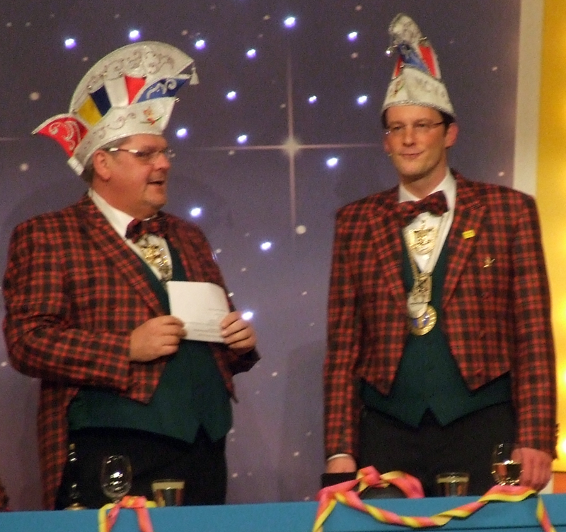 Sitzungspräsident Heinz Meller (links) und Michael Ebling (rechts), Fastnachtssitzung des Mombacher Carneval Verein 1886 e.V. „Die Bohnebeitel“